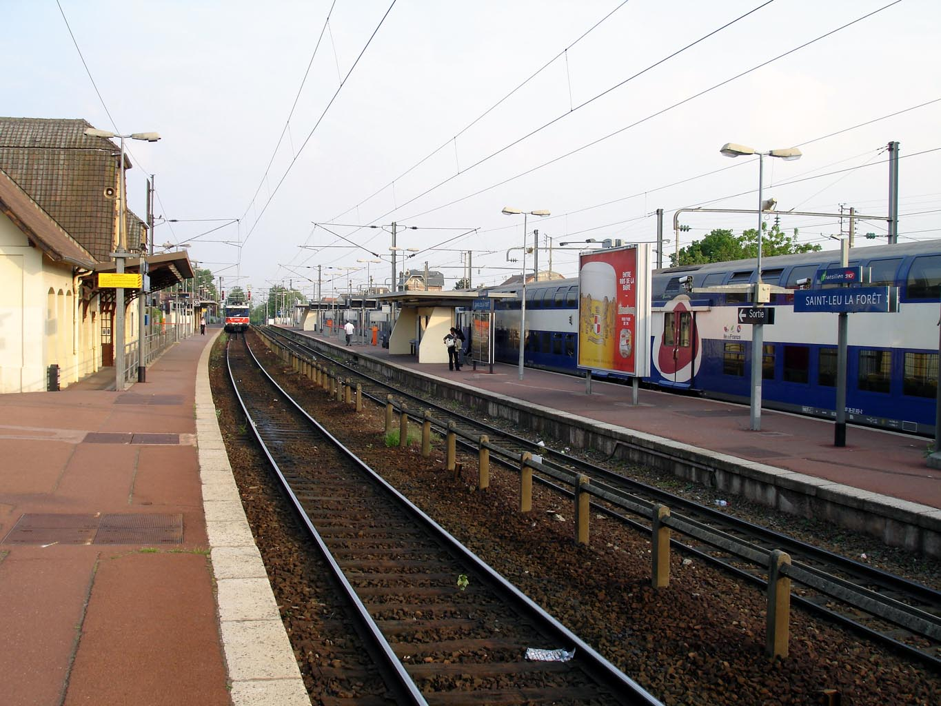 Gare de Saint-Leu-la-Forêt (Val-d'Oise), France